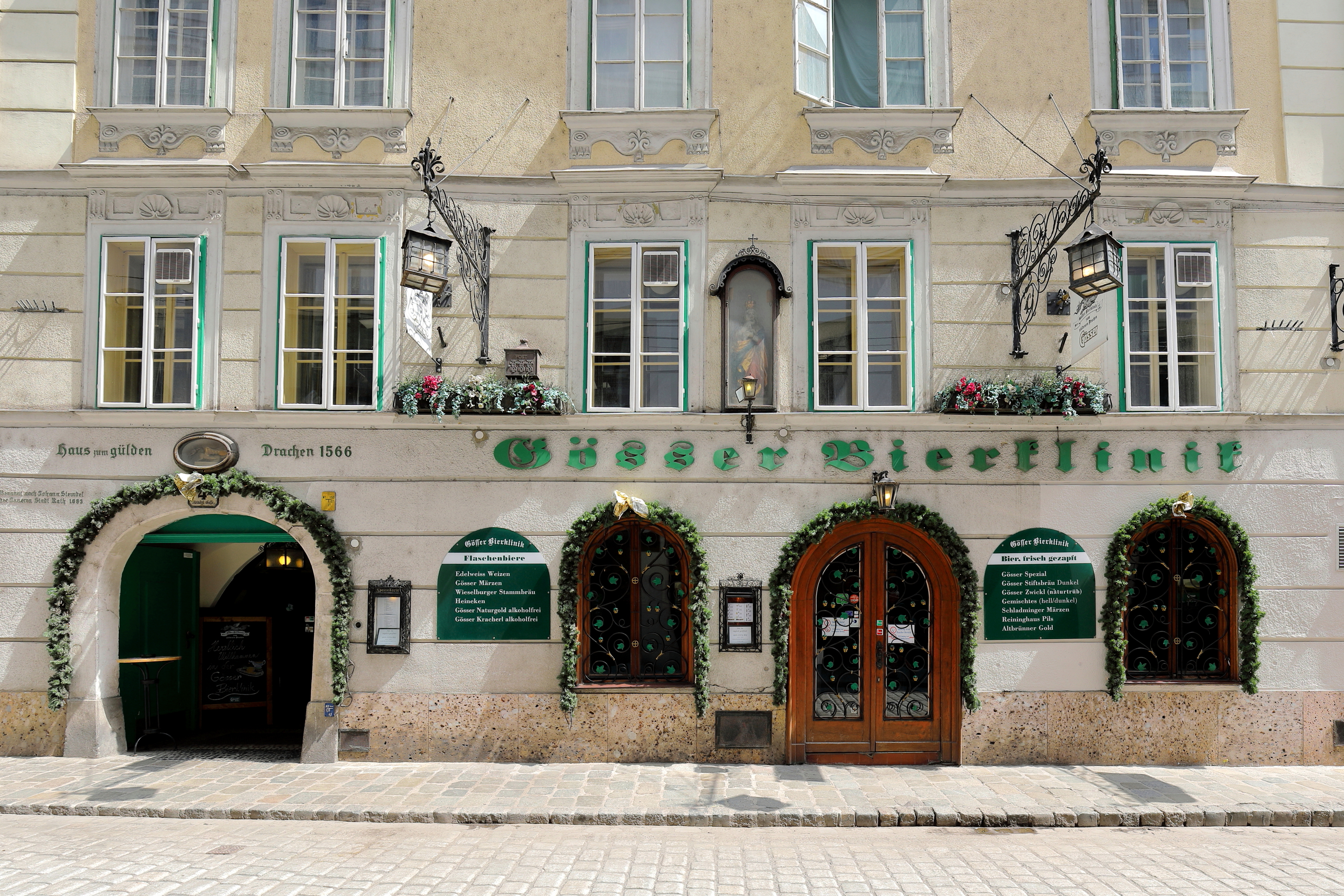 Die Gösser Bierklinik an der Adresse Steindlgasse 4 im 1. Wiener Gemeindebezirk Innere Stadt.Das Haus beherbergt die älteste, noch bestehende Gaststätte Wiens und firmiert heute unter dem Namen „Gösser Bierklinik“. 1665 lässt sich als Besitzer Johann Georg Steindl (Staindl) belegen, der das Haus als Lohn für seine Tapferkeit geschenkt bekommen haben soll und darin ein Gaststätte eröffnet haben soll. Ende 1923 erwarb die Gösser Brau A.G. das Haus, in dem zuvor die Gaststätte Pilsner Bierklinik sich befand. Am 10. September 1944 wurde das Haus durch mehrere Bombentreffer schwer beschädigt, wiederinstandgesetzt und steht aktuell unter Denkmalschutz.